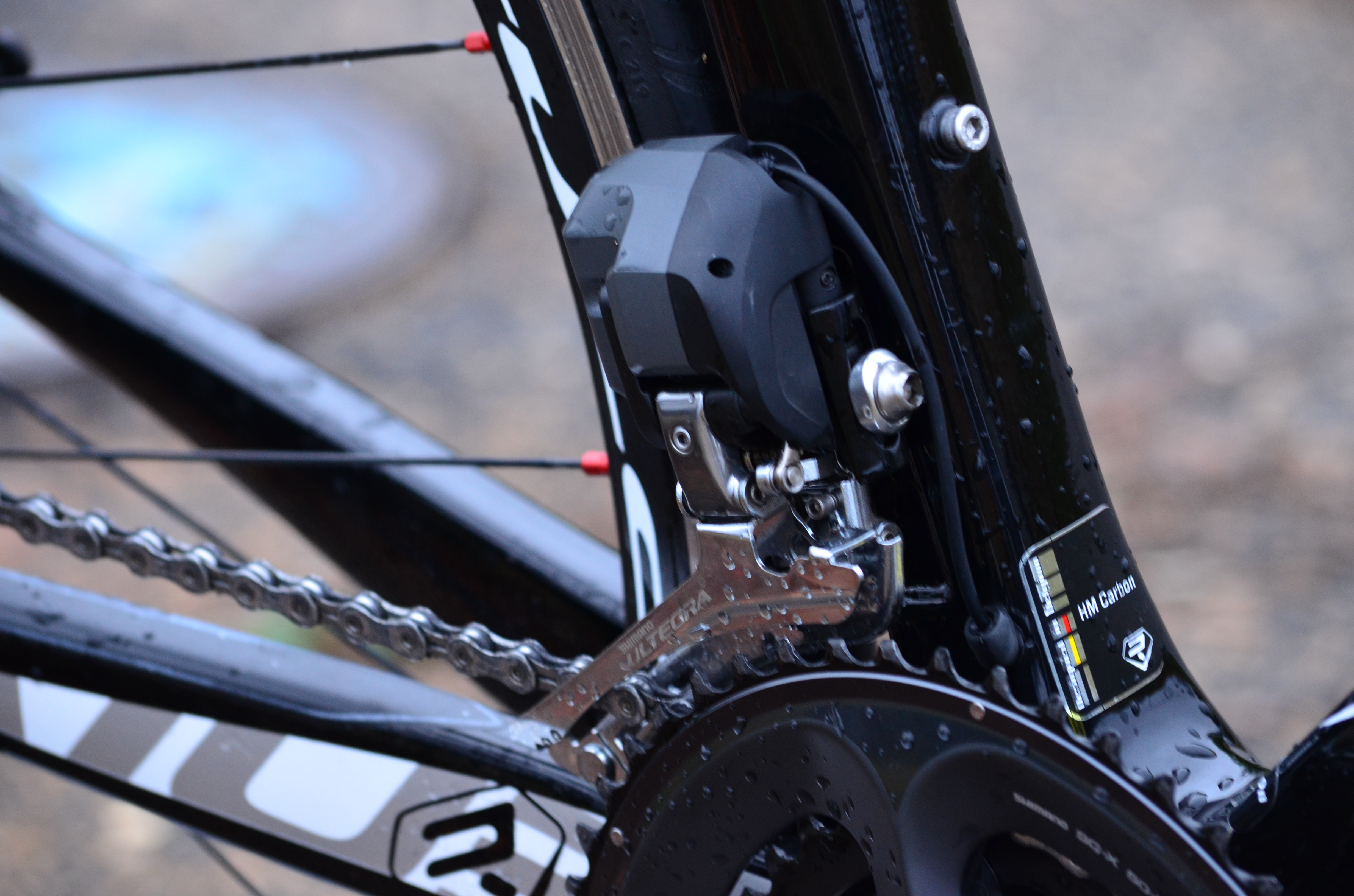 Ultegra Di2 Fulcrum Racing Quattro